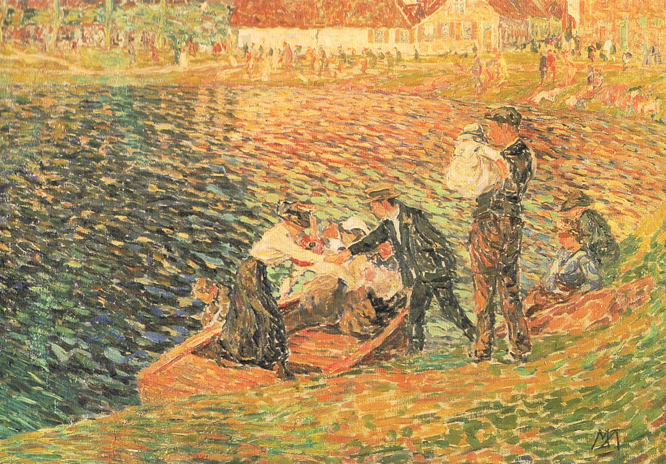 Le passage